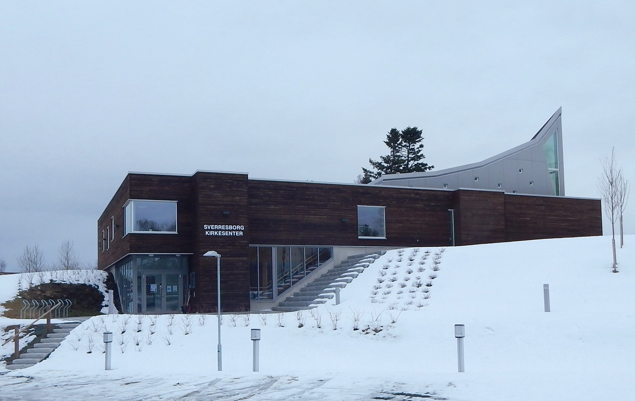 Sverresborg kirkesenter i Trondheim